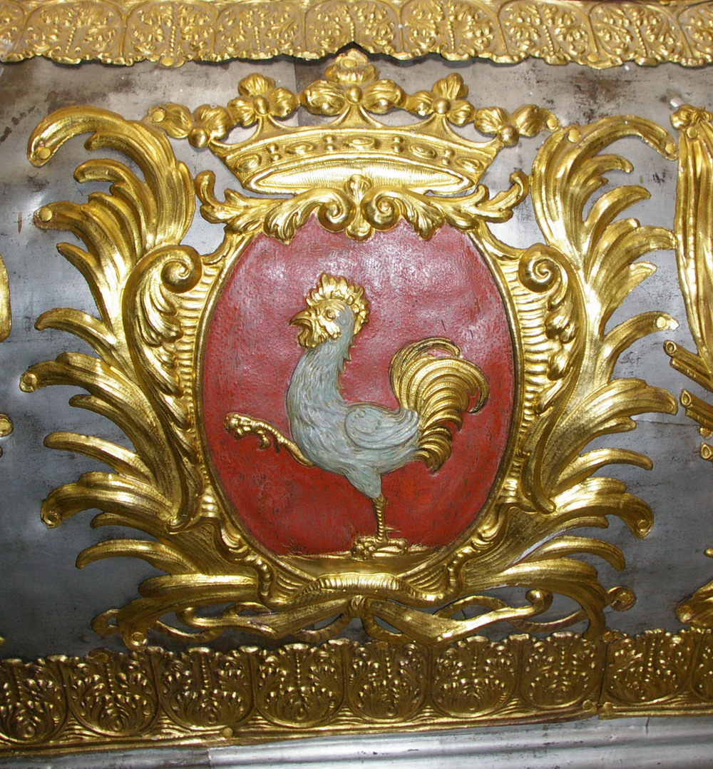 Zdjęcie płaskorzeźby z tumby